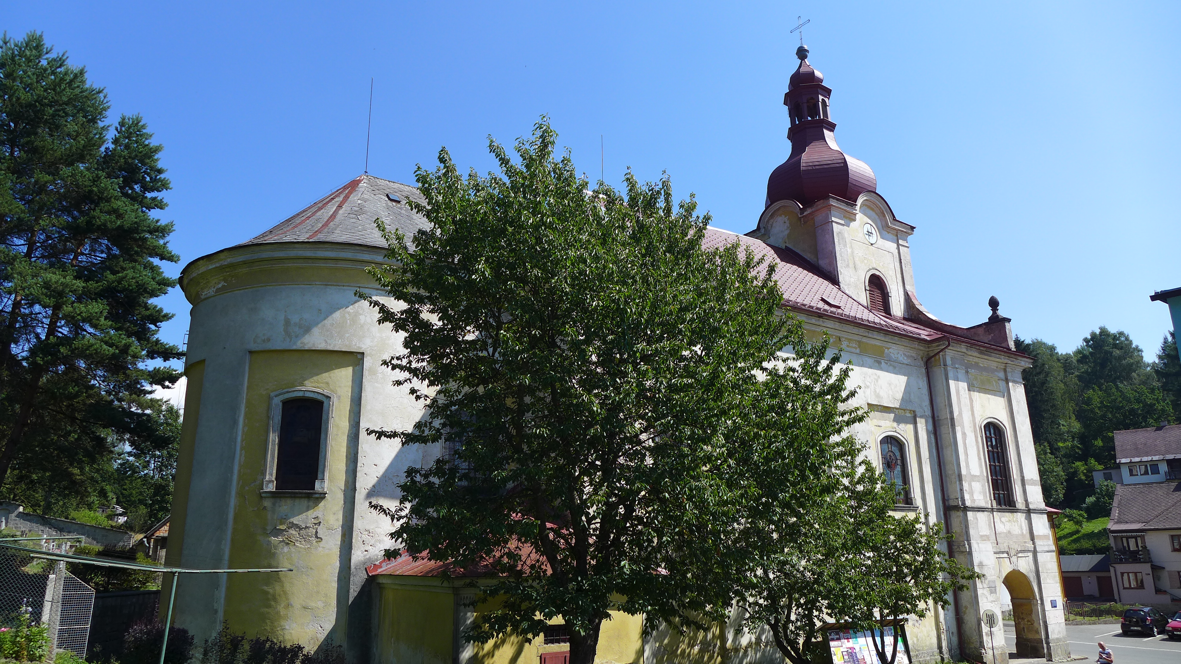 Kostel svatého Vavřince, Teplice nad Metují.